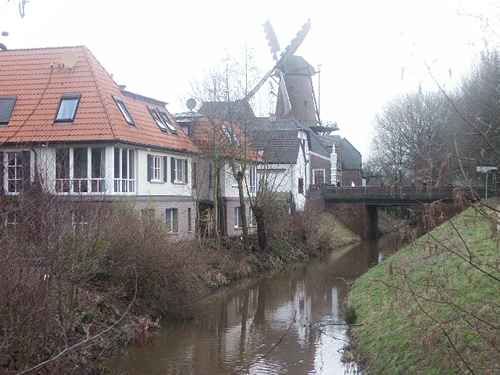 Kalkar, windmolen nabij de beek de Leybach